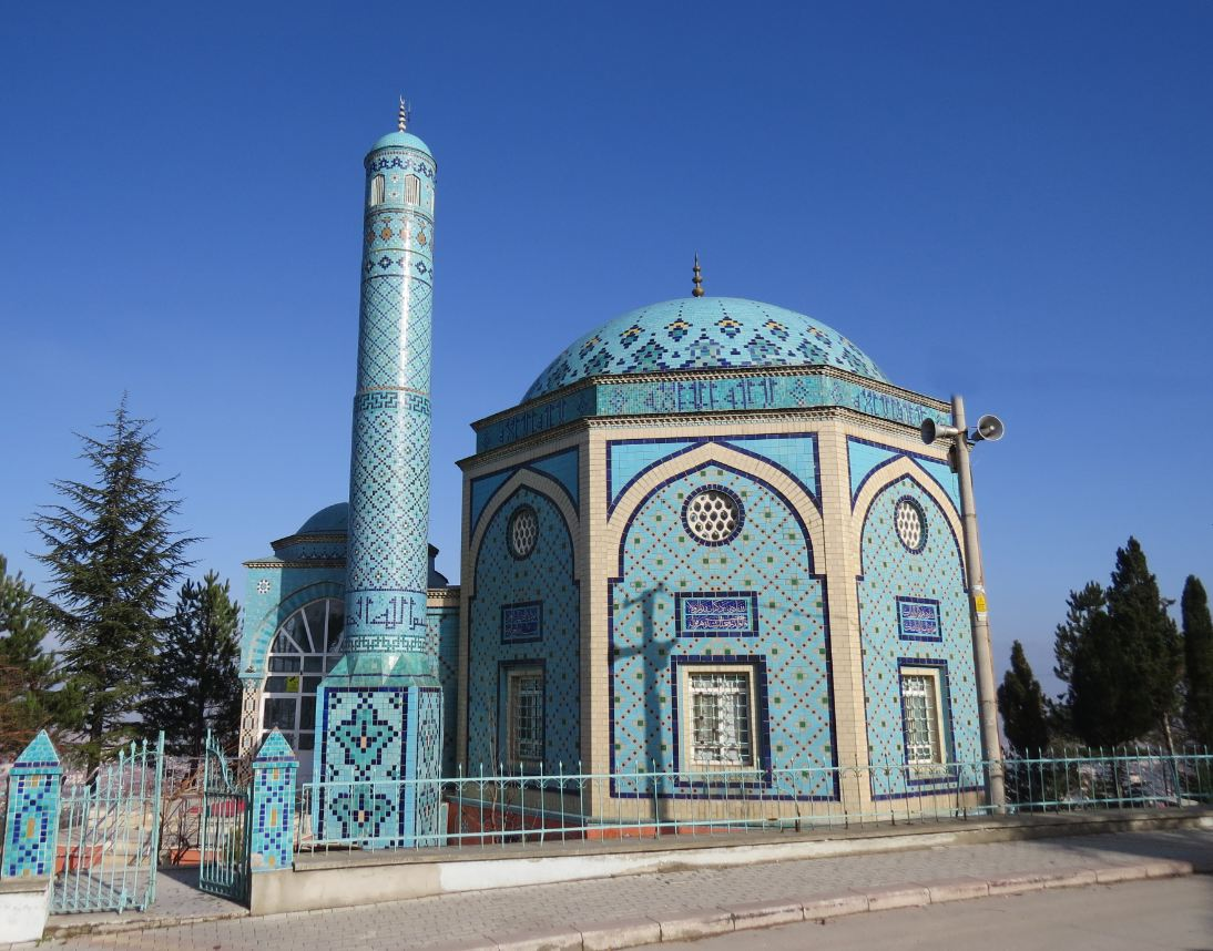 Çinili Cami, Kütahya.